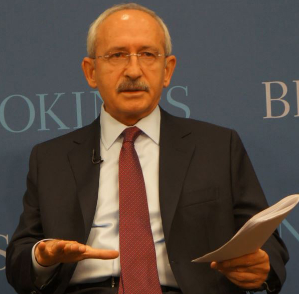 Kemal Kılıçdaroğlu'nun Aralık 2013'te gerçekleştirdiği Washington ziyaretinden bir kare.